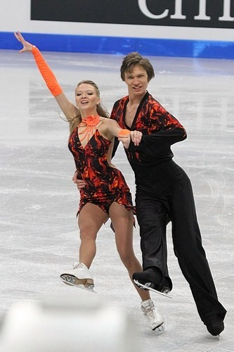 Виктория Ковалёва и Юрий Беляев (Белоруссия) на чемпионате мира по фигурному катанию среди юниоров 2012